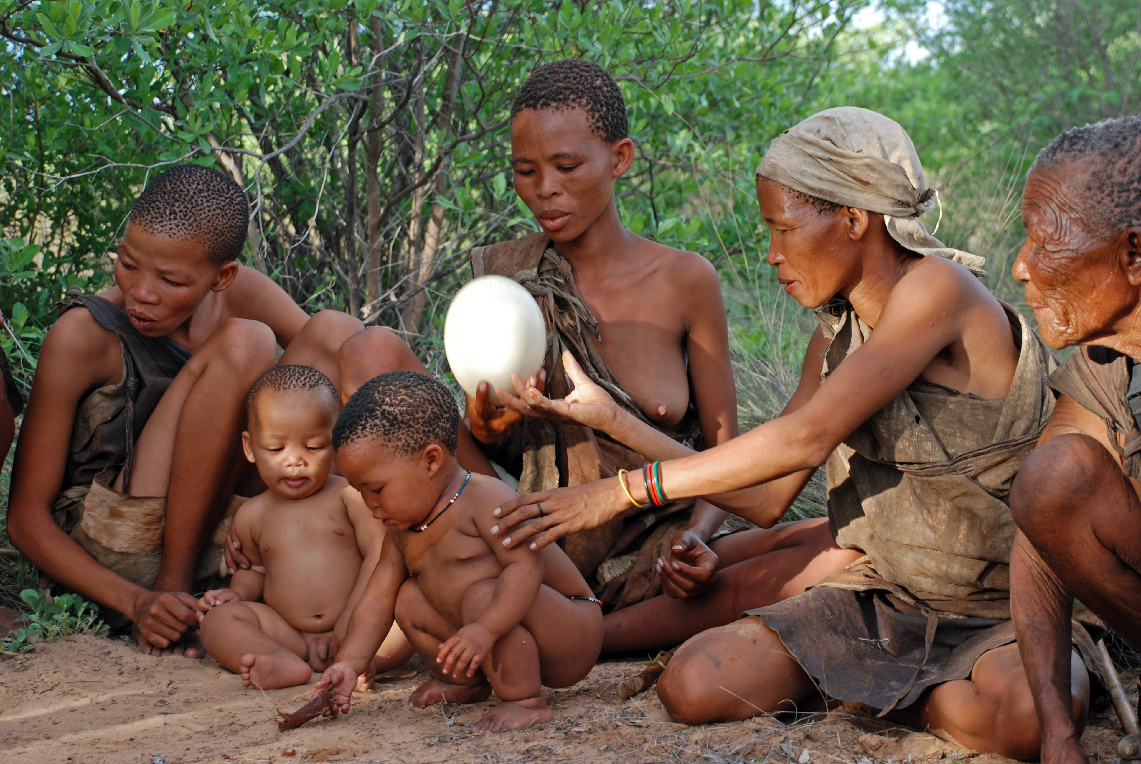 San-Gruppe aus dem südlichen Afrika